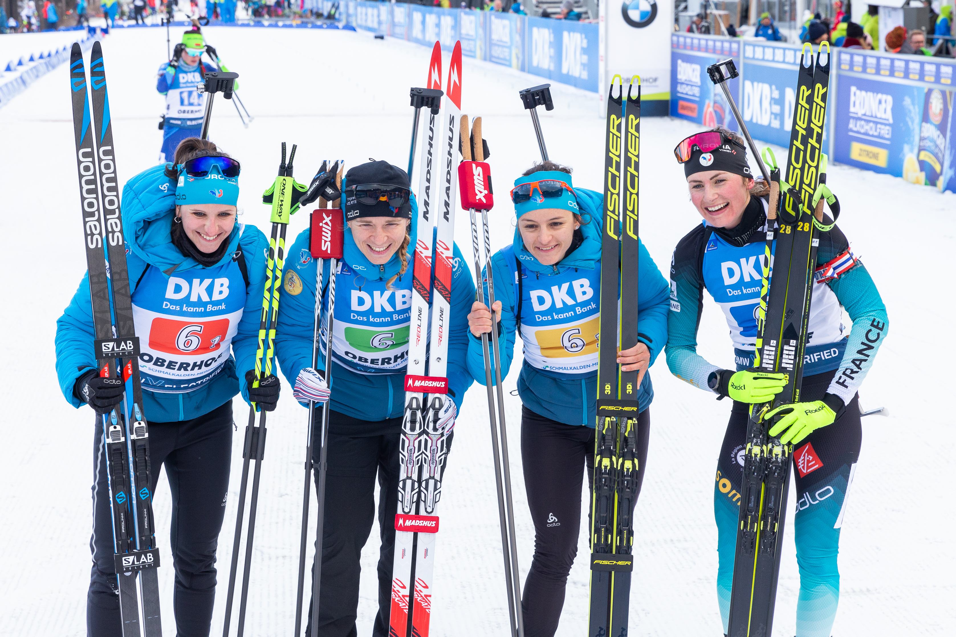 IBU World Cup Biathlon Oberhof; Jubel, celebration bei Frankreich über Bronze; v.li.: Julia Simon, Anais Bescond, Celia Aymonier, Justine Braisaz (FRA, Frankreich); Drittplatzierter, Bronzemedaille, bronze medal